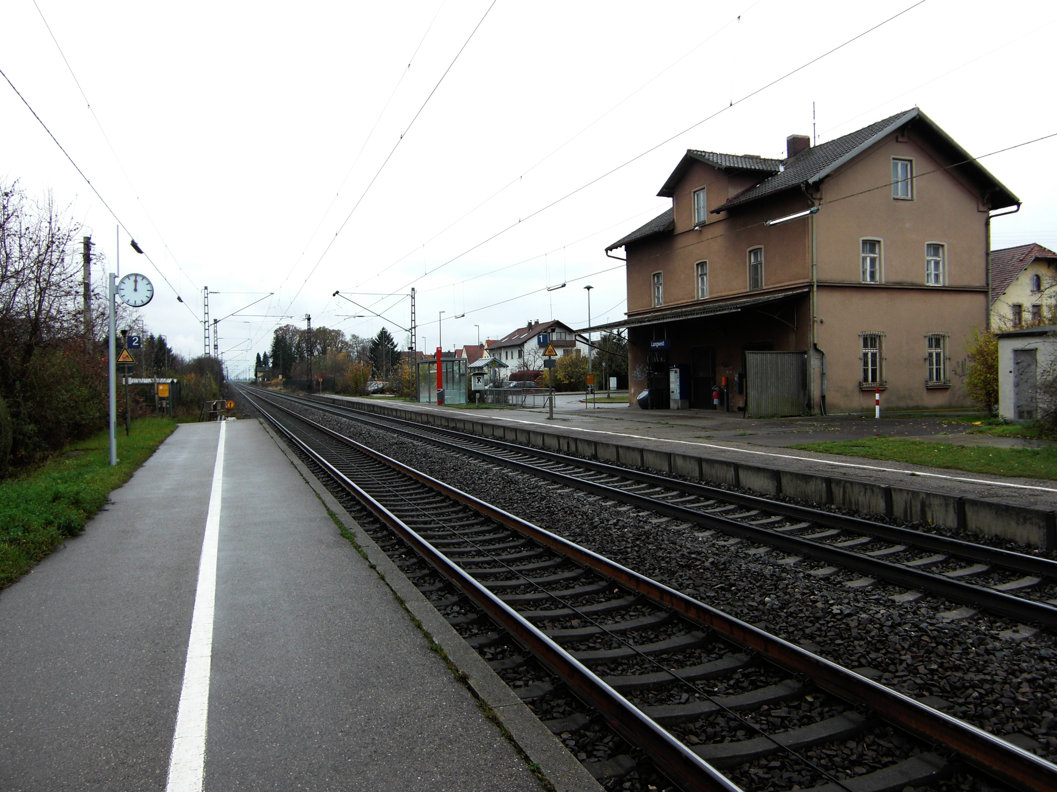 Langweid am Lech, Bahnhof